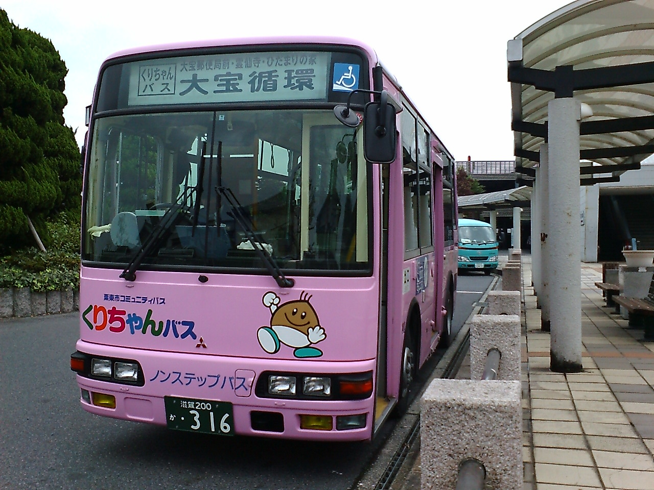 Kurichan Bus in Ritto Station